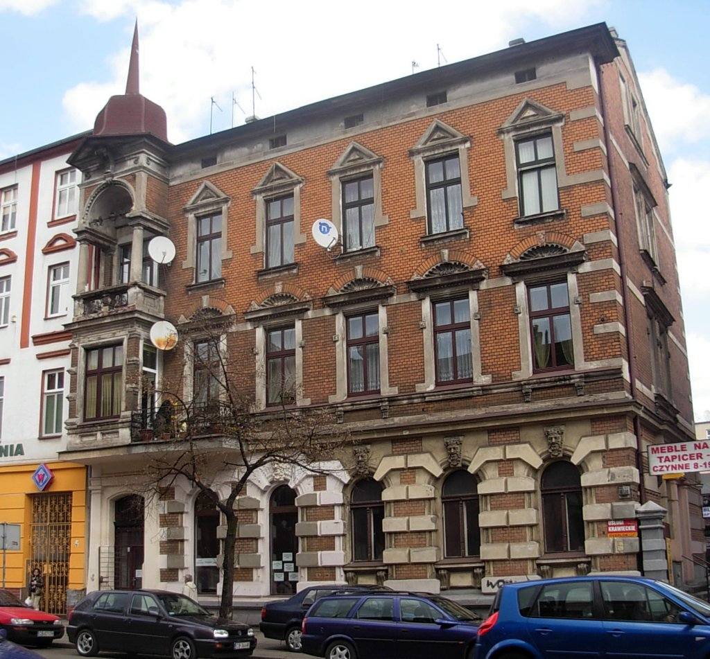 Kamienica ul. Dworcowa 98 w Bydgoszczy